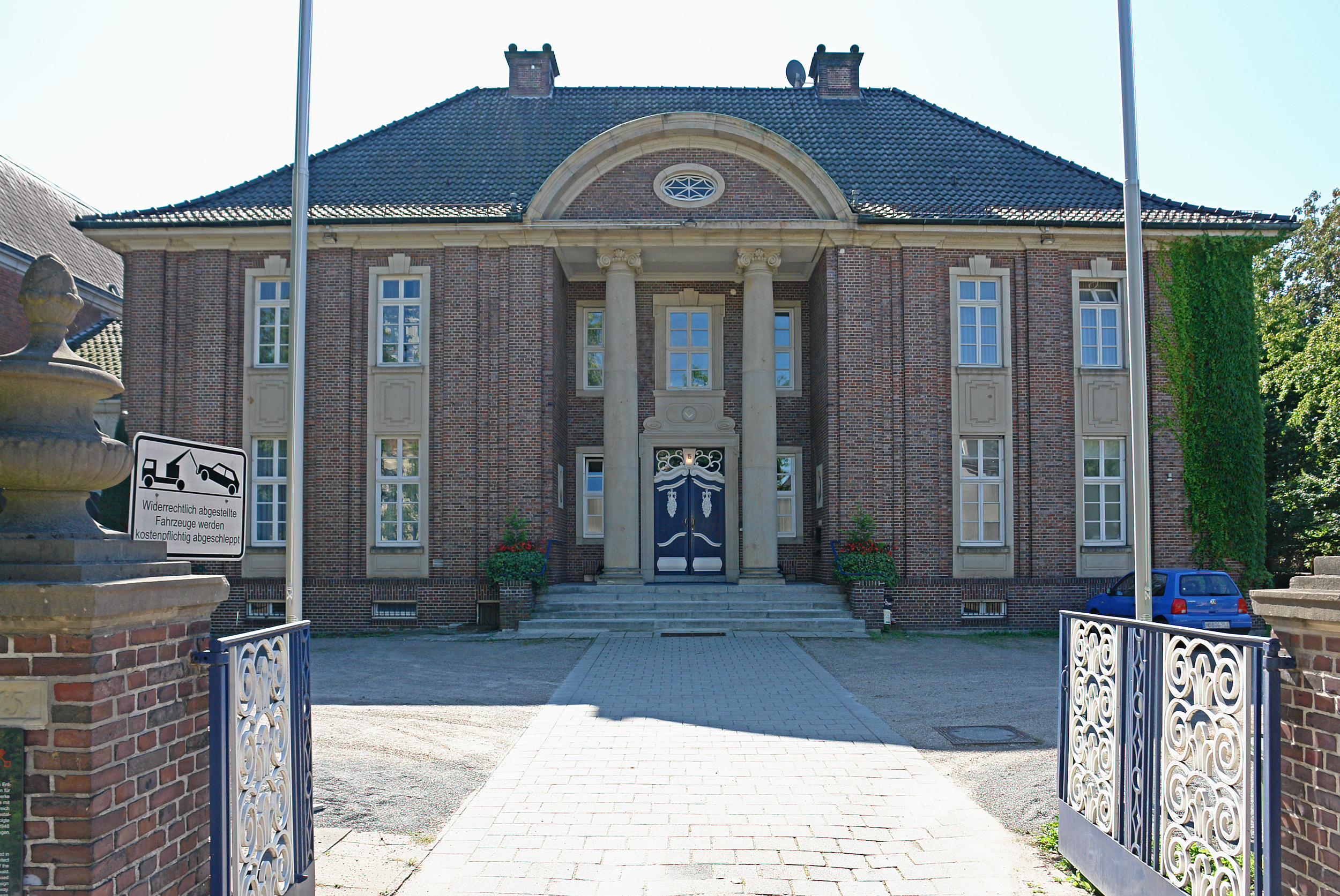 Bremer Logenhaus in Bremen, Kurfürstenallee 15Das abgebildete Objekt ist ein geschütztes Kulturdenkmal in der Freien Hansestadt Bremen, mit der Nr. 0821 beim Landesamt für Denkmalpflege registriert.